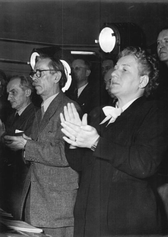 Berlin, Volkskammersitzung, Schmidt, Nagel Zentralbild Quasch. 14.3.52 Vollsitzung der Volkskammer. Die Volkskammer der DDR nahm am 14.3.52 zu der von der Sowjetregierung den Westmächten übermittelten Note über die Grundlagen eines Friedenvertrages mit Deutschland Stellung. UBz: Elli Schmidt und Prof. [Otto] Nagel nach Beendigung der Regierungserklärung. Abgebildete Personen: Nagel, Otto Prof.: Maler, Präsident der Akademie der Künste (AdK), Nationalpreisträger, Vaterländischer Verdienstorden (VVO) in Gold, DDR (GND 118586300) Schmidt, Elli: KPD, ZK der SED, Volkskammerabgeordnete, Demokratischer Frauenbund Deutschlands (DFD), DDR